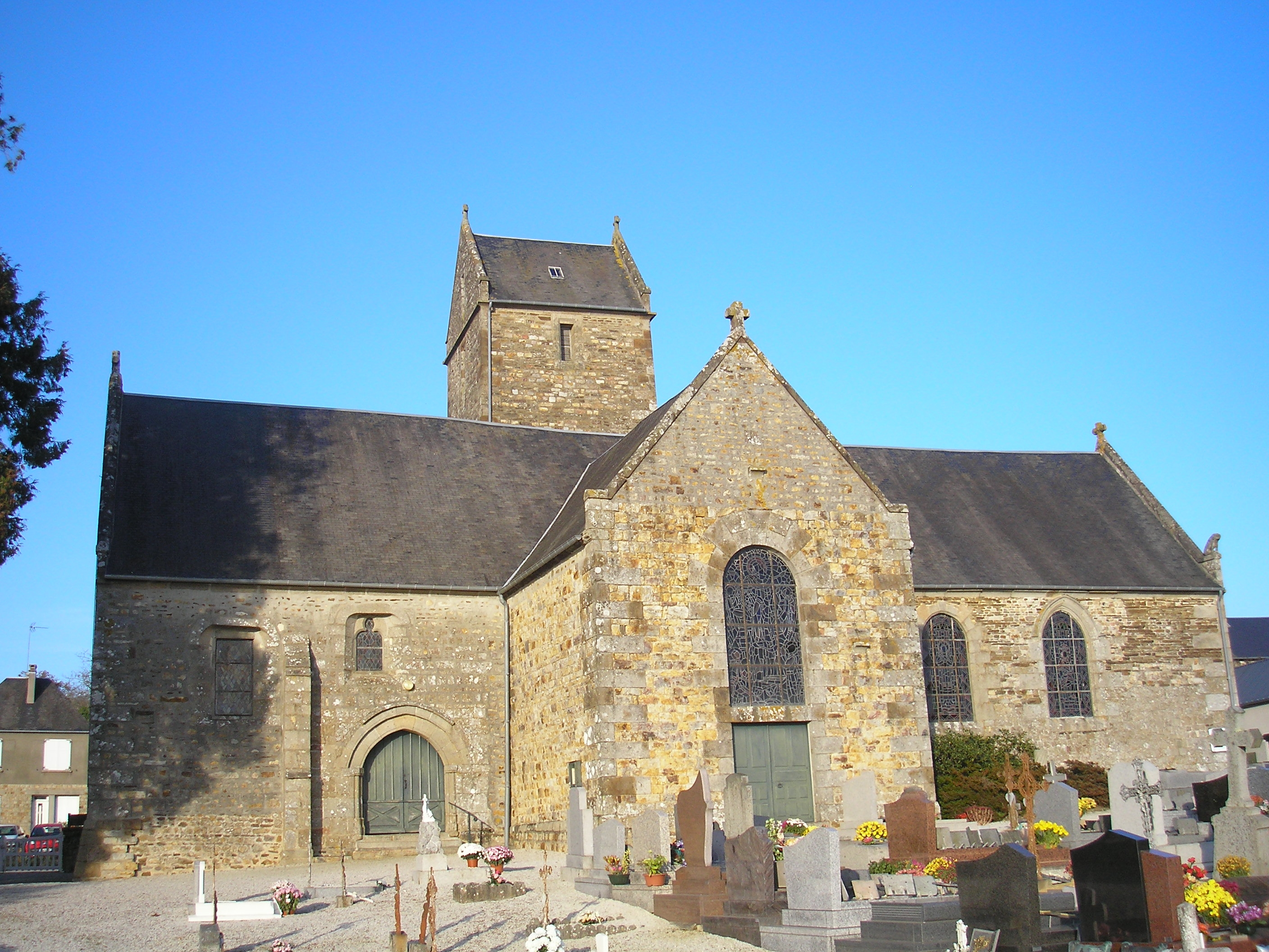 Romagny (Normandie, France). L'église Notre-Dame.